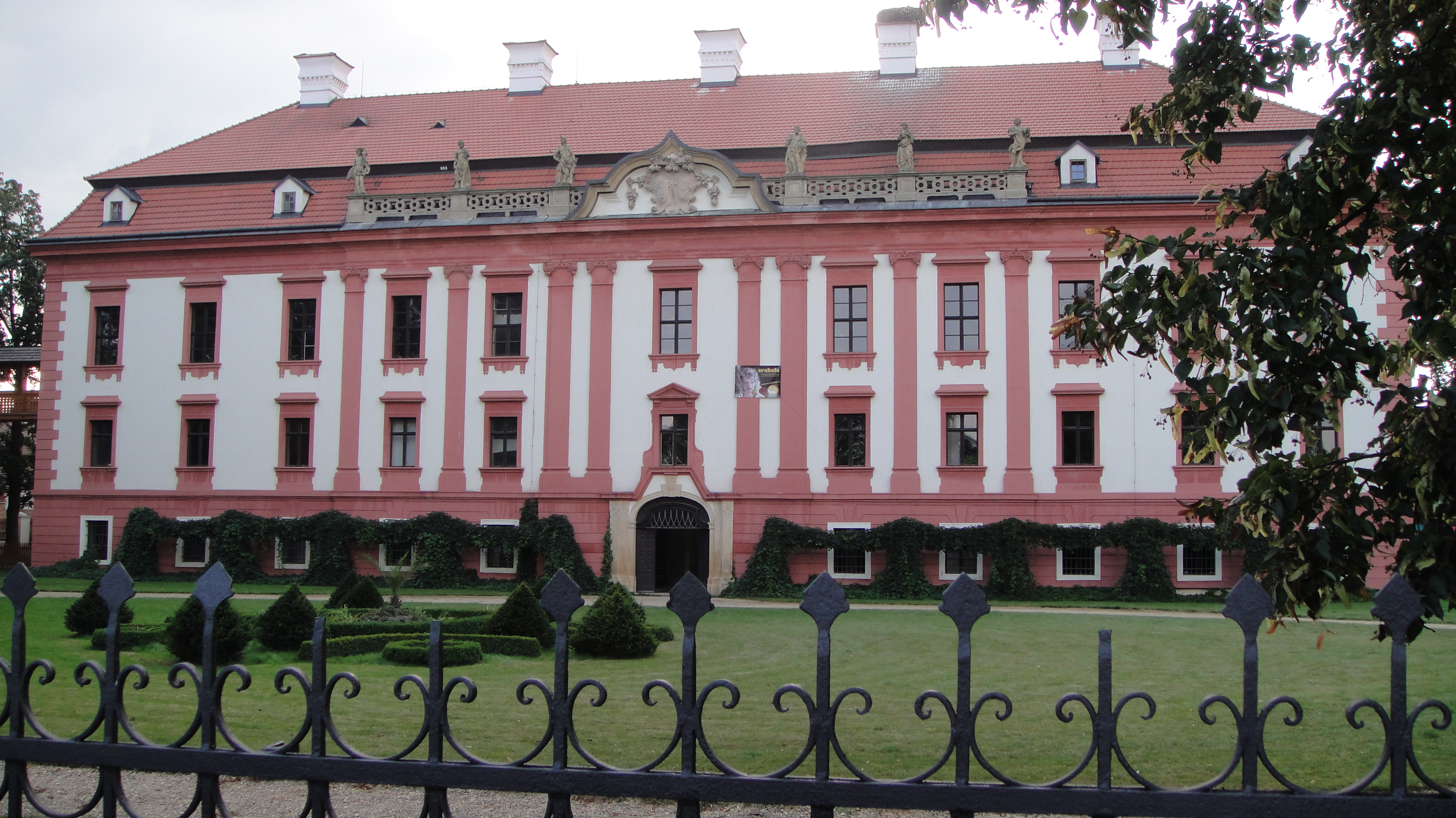 Průčení zámku v Kuníně.